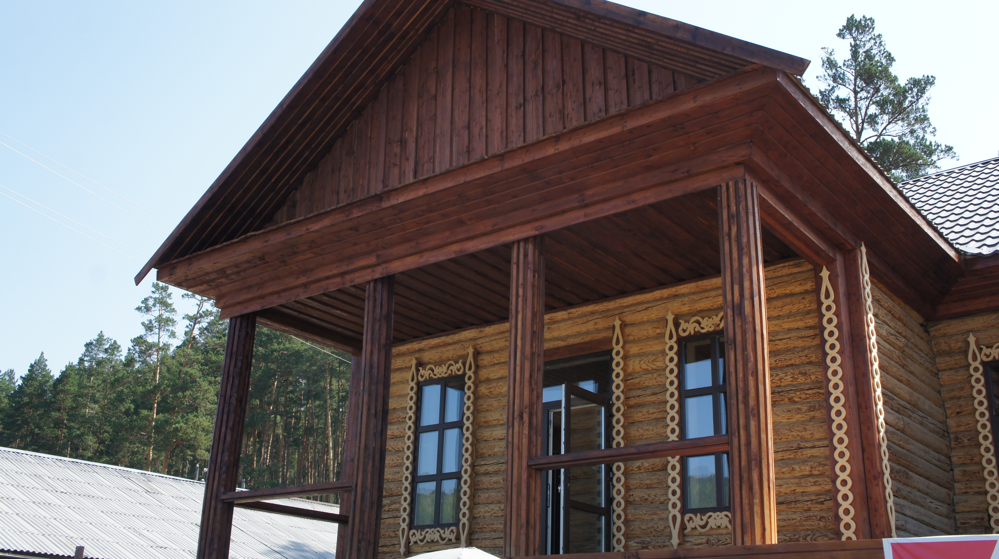 Столовая в Усть-Семе, на крыльце которой начинаются первые кадры фильма "Живёт такой парень"